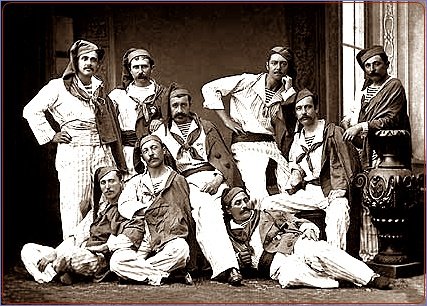 Inmigrantes Italianos en el Perú Siglo XIX